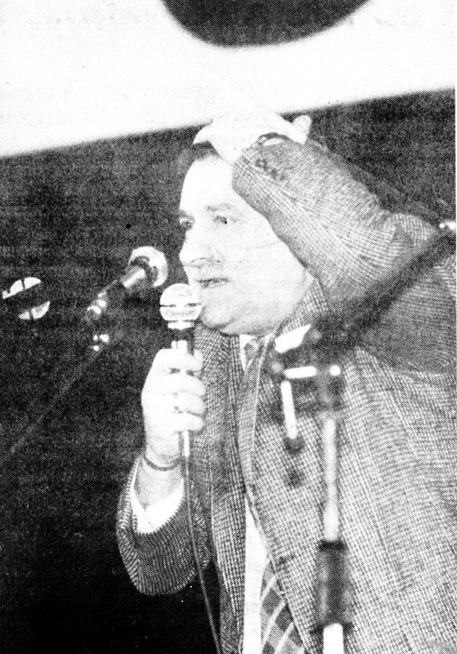 Lech Wałęsa na wiecu we Wrocławiu, wrzesień 1990